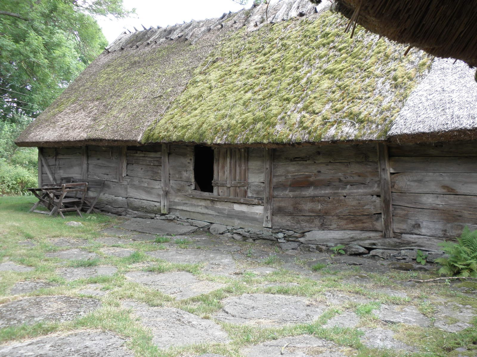 Åkraberg